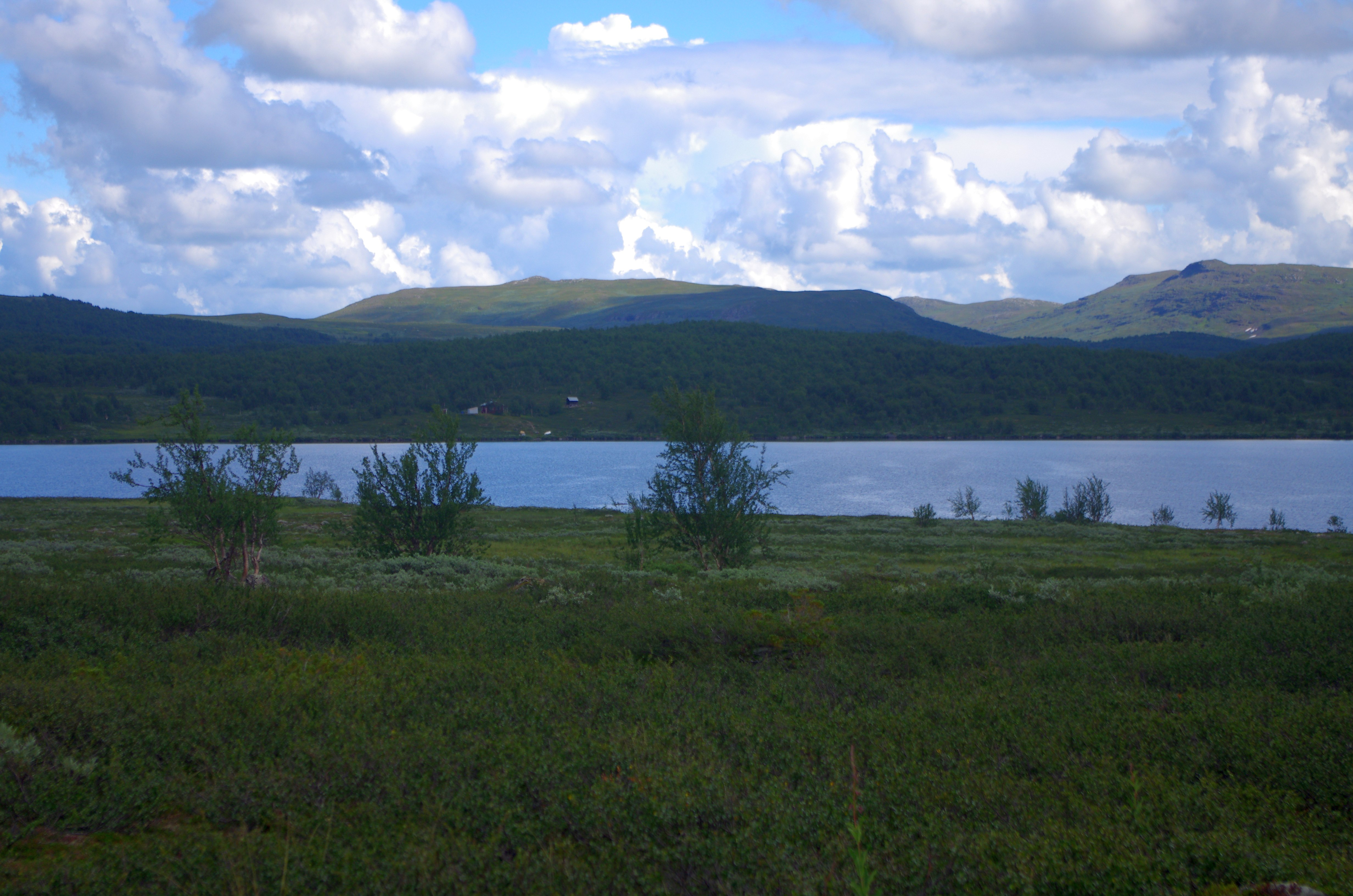 Ahajaure (Ahájávrrie) en sjö i Arjeplogs kommun i Lappland i Sverige.